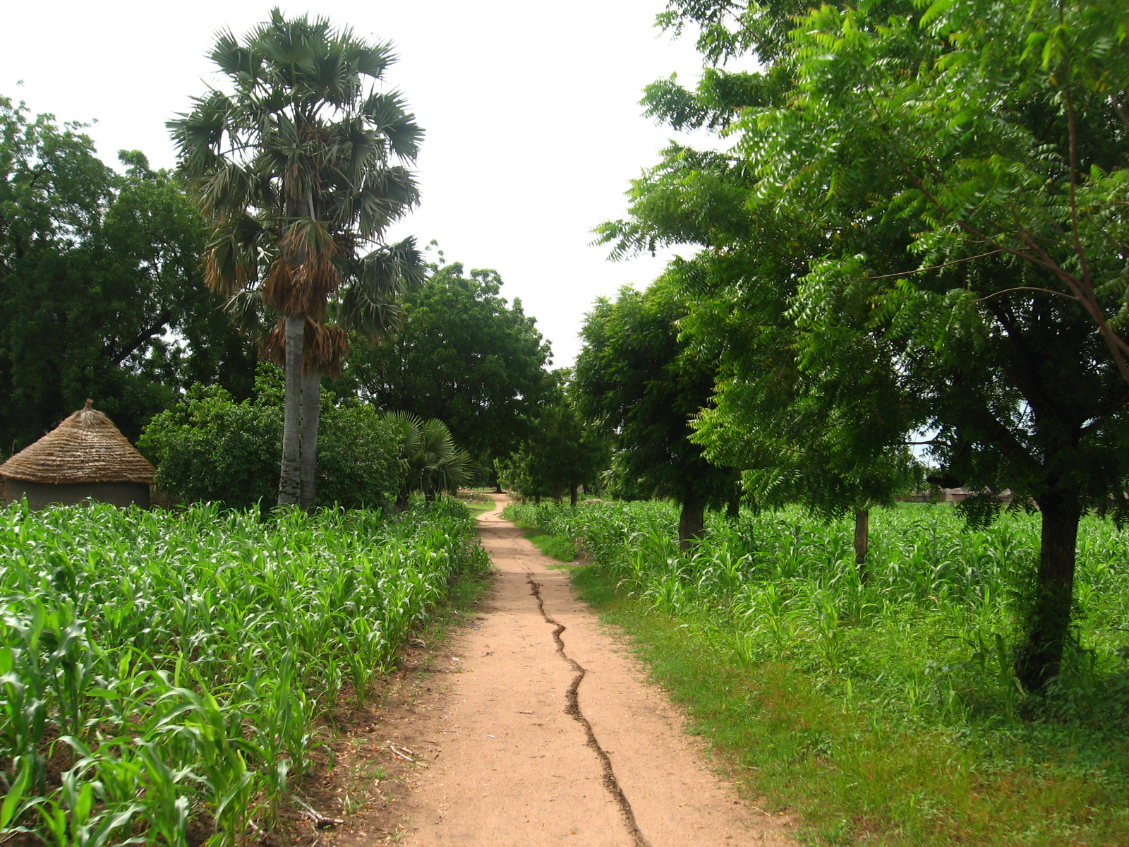 Chemin dans le village de Broui, dans l'extrème nord du Cameroun.